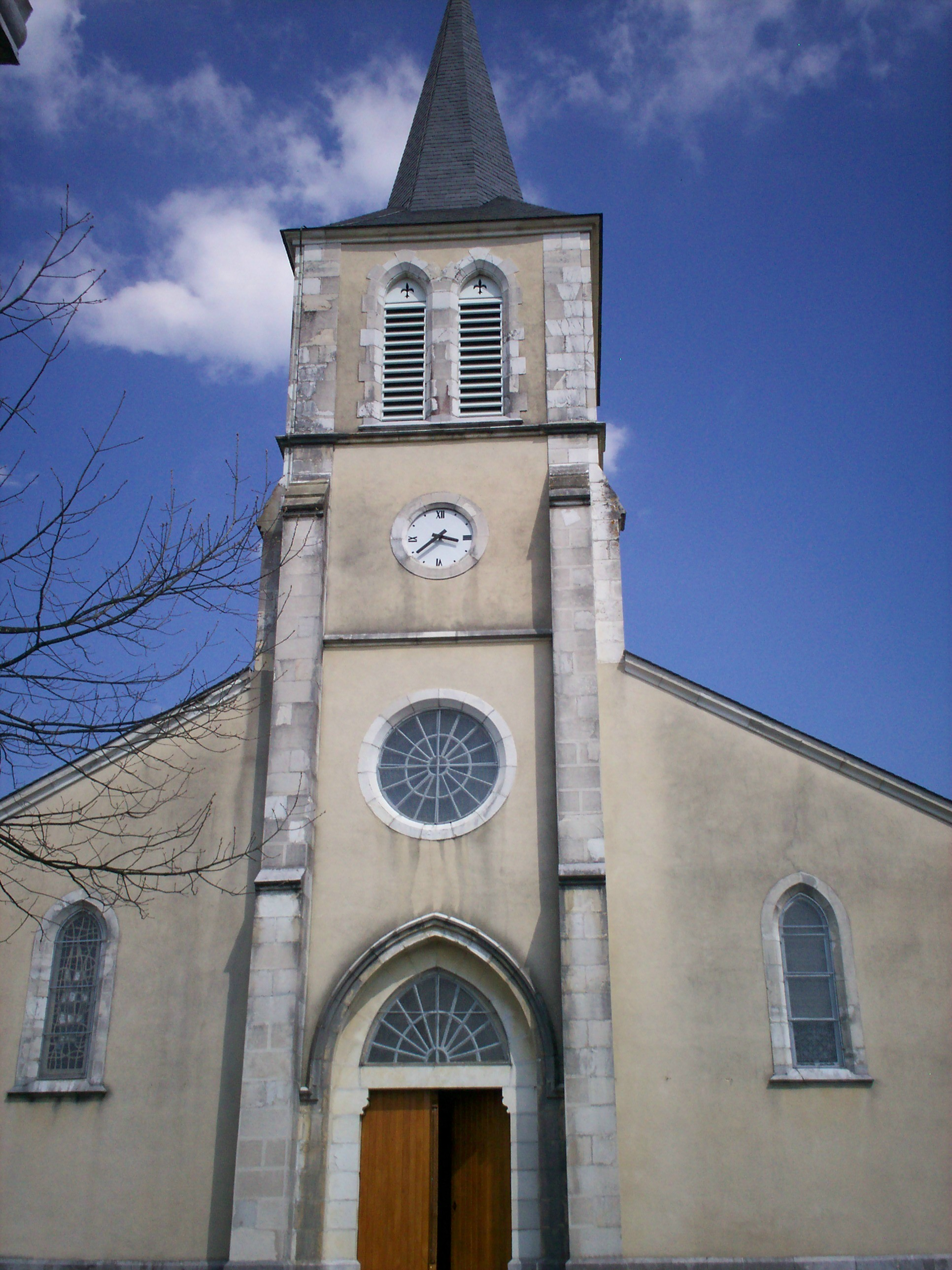 Glèisa de Bordèras